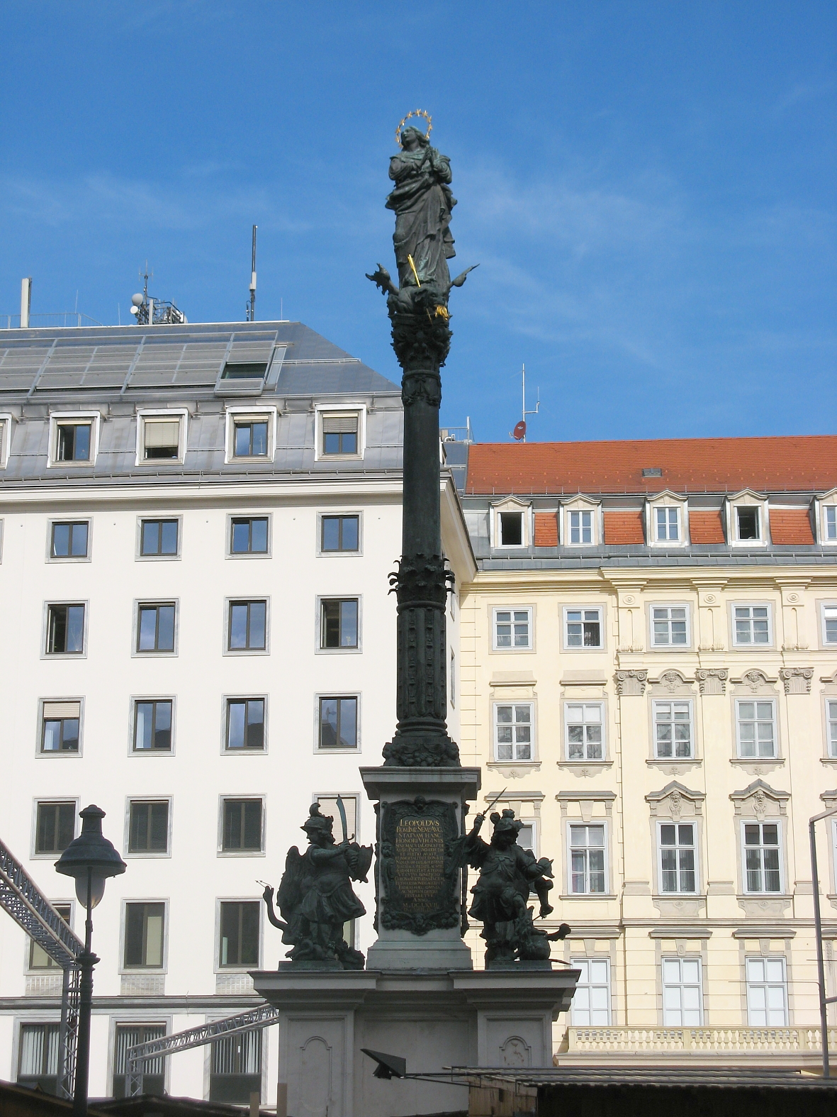 Mariensäule (1646) von Carlo Martino Carlone und Carlo Canevale, Am Hof, Wien-Innere Stadt